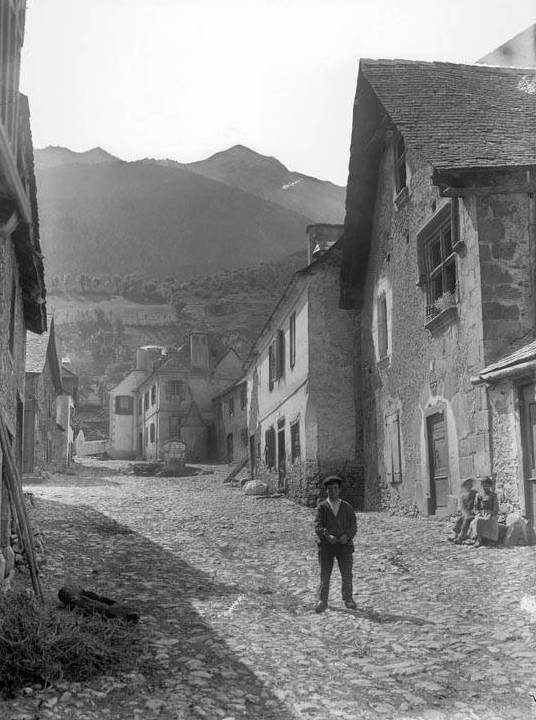 Imatge